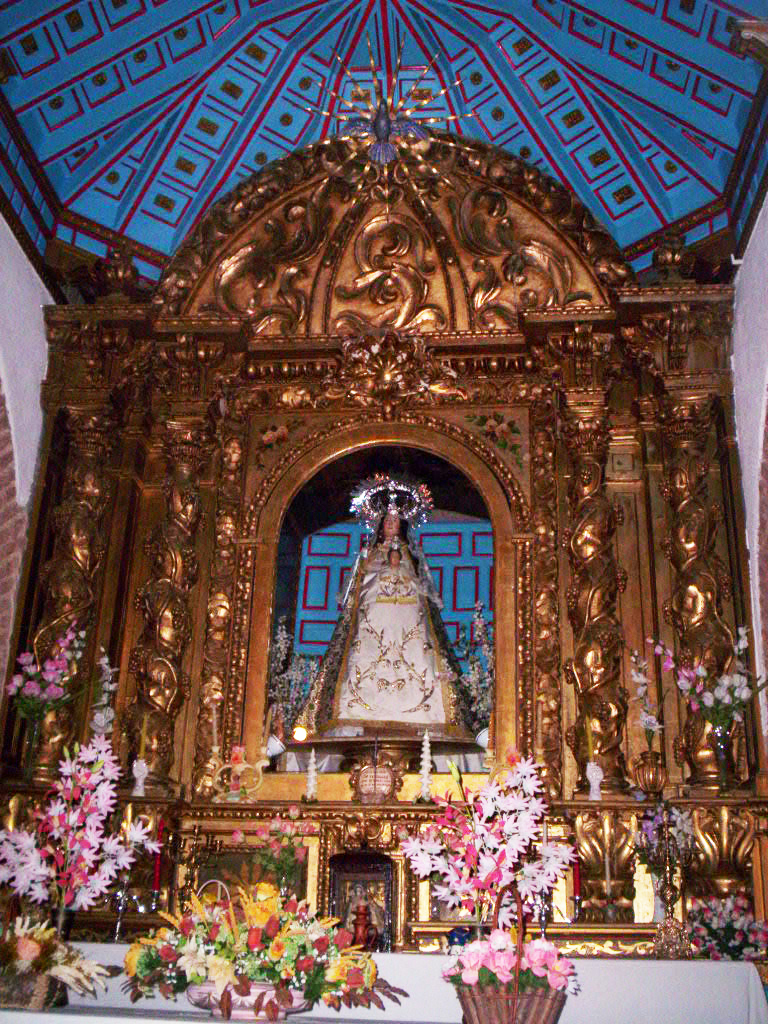 Ermita de la Virgen del Castillo (Chillón, Ciudad Real). Retablo e imagen de la Virgen.